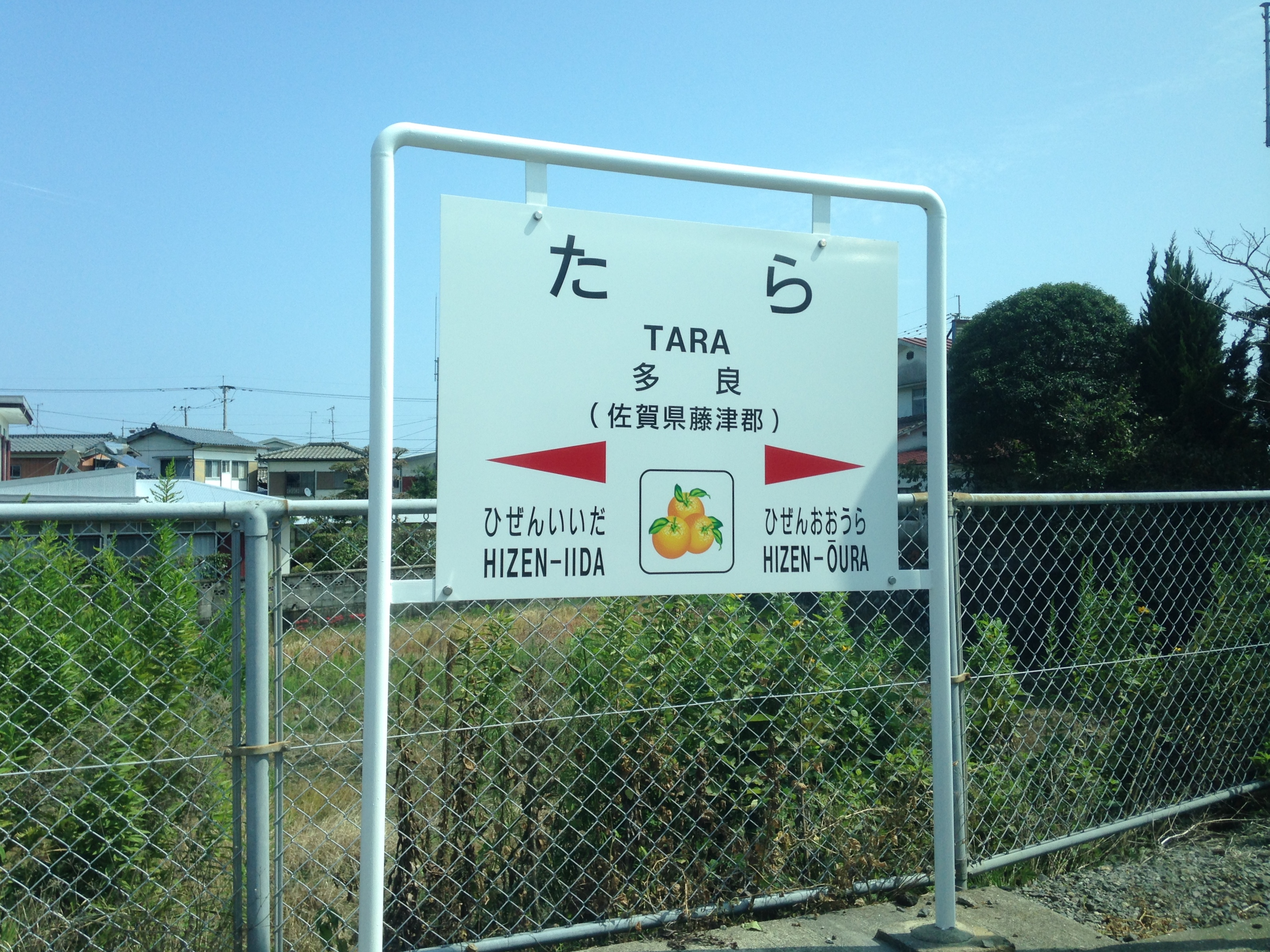 「かもめ」車内より望む多良駅の駅名標。イラストはミカン